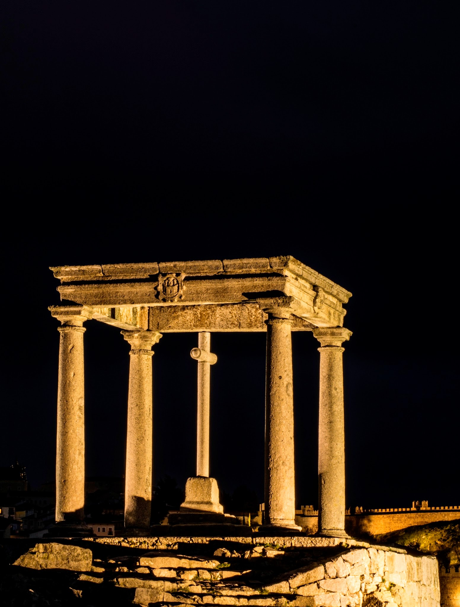 Los Cuatro Postes. Lugar que ejerce como mirador de las murallas de la ciudad de Ávila.